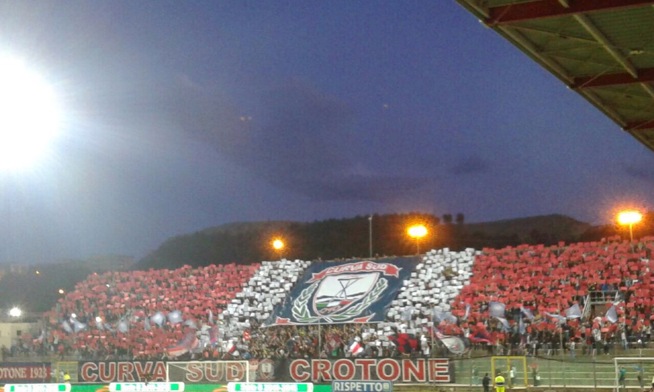 Coreografia curva sud - Crotone-Virtus Entella 0-0 - 22/05/2015